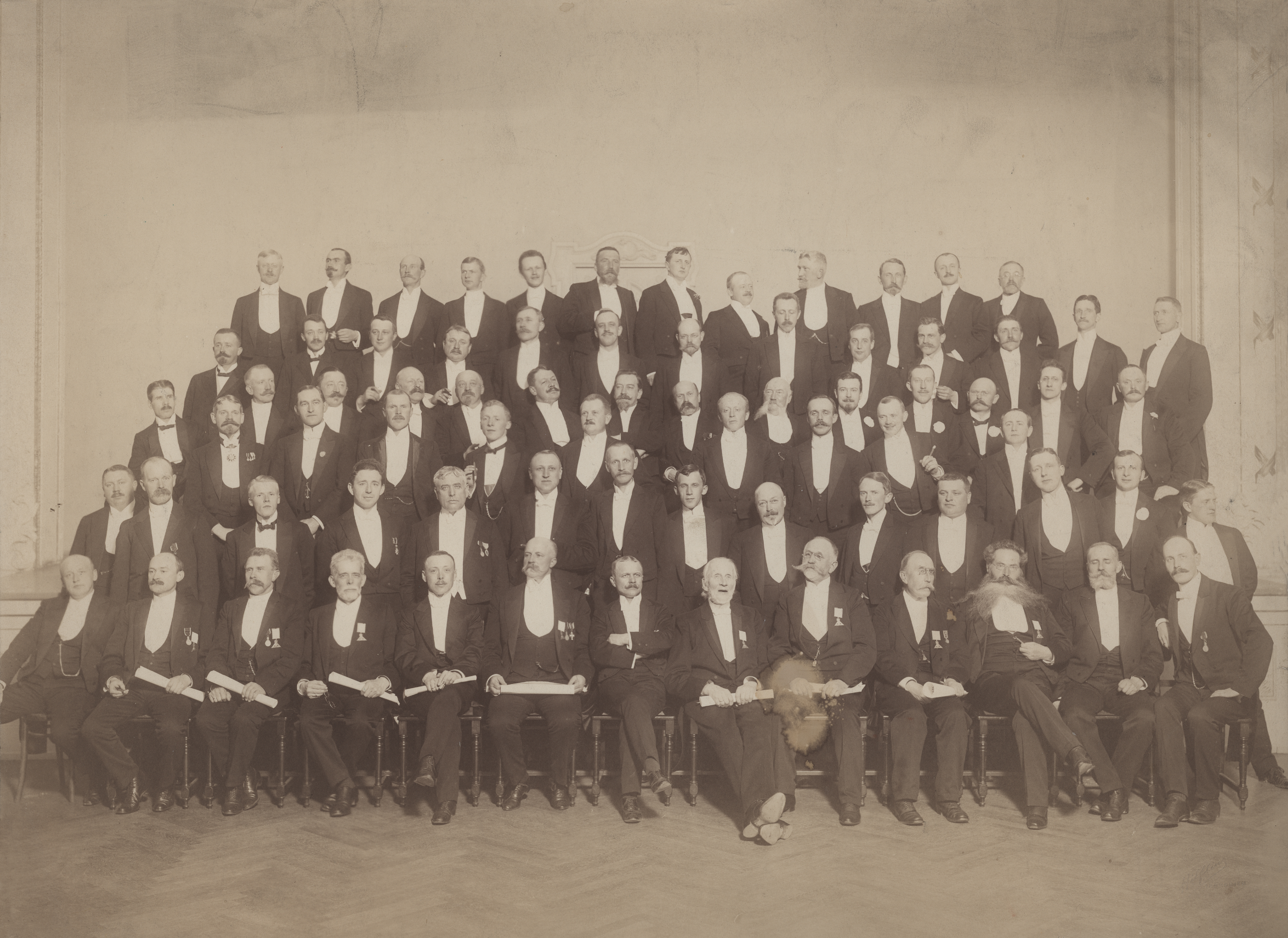 Format: Fotopositiv Dato / Date: ca. 1910? Fotograf / Photographer: Ukjent Sted / Place: Trondheim Wikipedia: Trondhjems Provincialloge Wikipedia: St. Johanneslogen Nordlyset Wikipedia: Ole Erichsen (1863 - 1949) Eier / Owner Institution: Trondheim byarkiv, The Municipal Archives of Trondheim Arkivreferanse / Archive reference: Tor.H44.Lxx.F9365 Merknad: Uvisst eksakt når bildet er tatt, men logen ble opprettet i 1905 som Trondhjems Stewardsloge og ble opphøyd til Trondhjems Provincialloge i 1915. St. Johanneslogen Nordlyset (innviet 1882) ble underlagt Provinciallogen ved samme anledning. Et av medlemmene som kan identifiseres på bildet er Ole Erichsen (1863 - 1949) som fungerte som logens provincialmester 1934 - 1949.